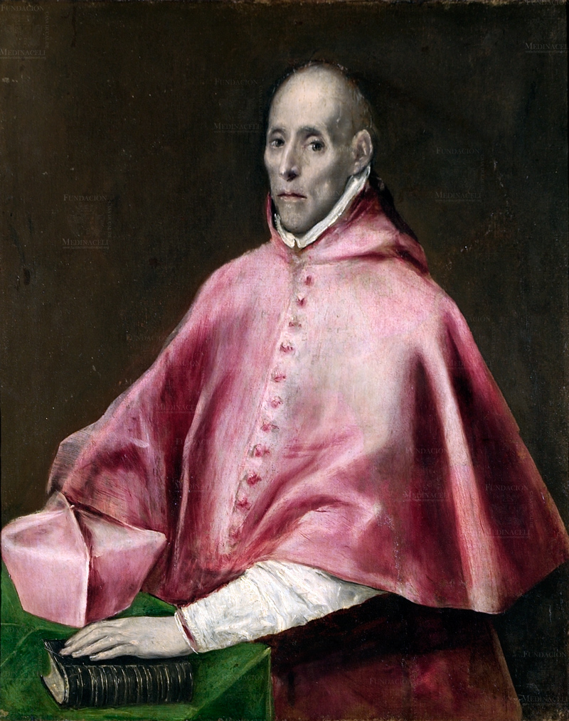 Retrato del cardenal Juan Pardo de Tavera (1472-1545), que fue arzobispo de Toledo y de Santiago de Compostela e inquisidor general de España.